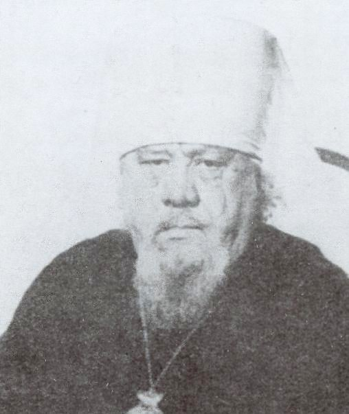 Metropolita warszawski i całej Polski Tymoteusz